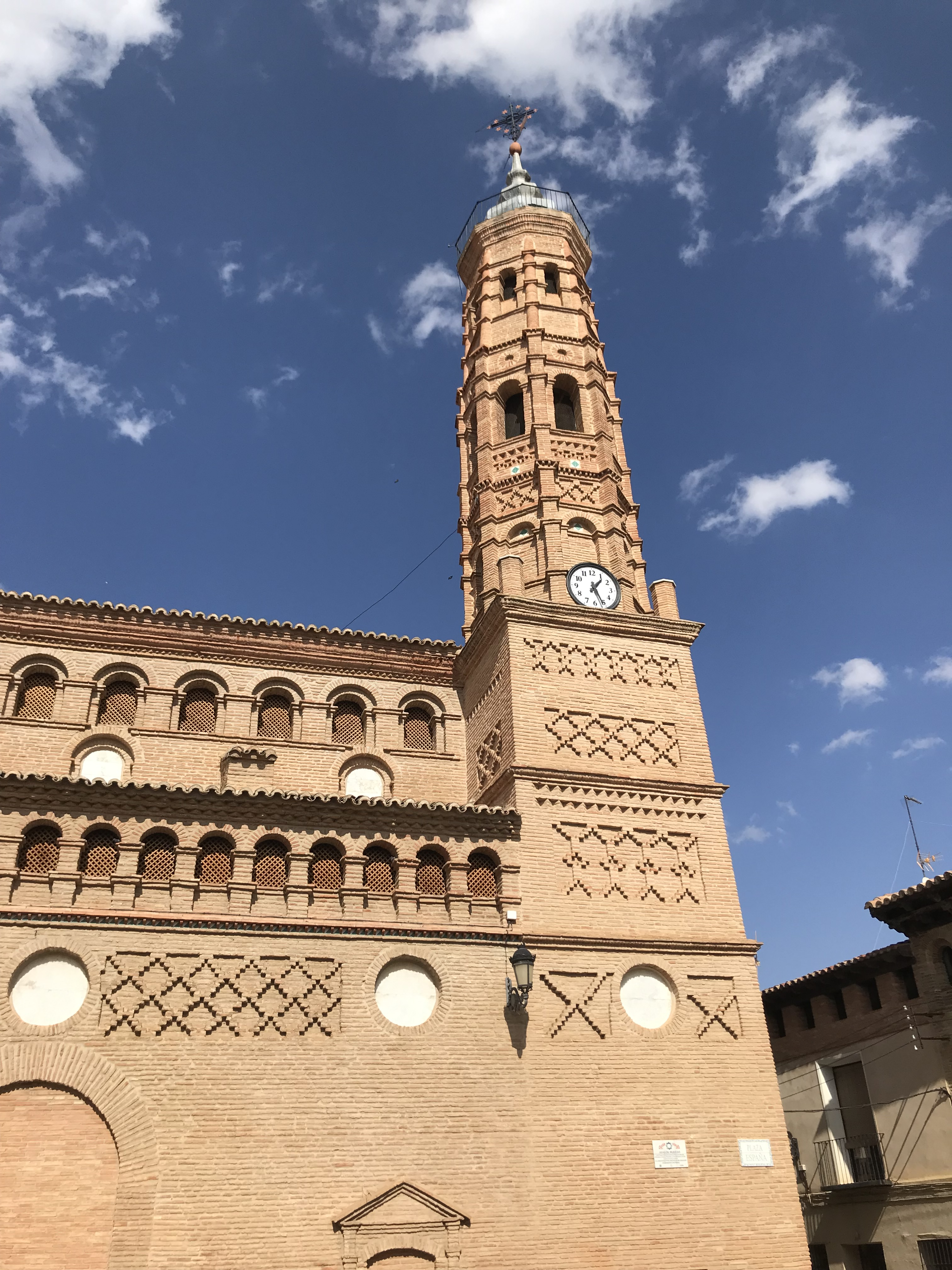 Torre mudejar de la Iglesia de Paniza, Zaragoza